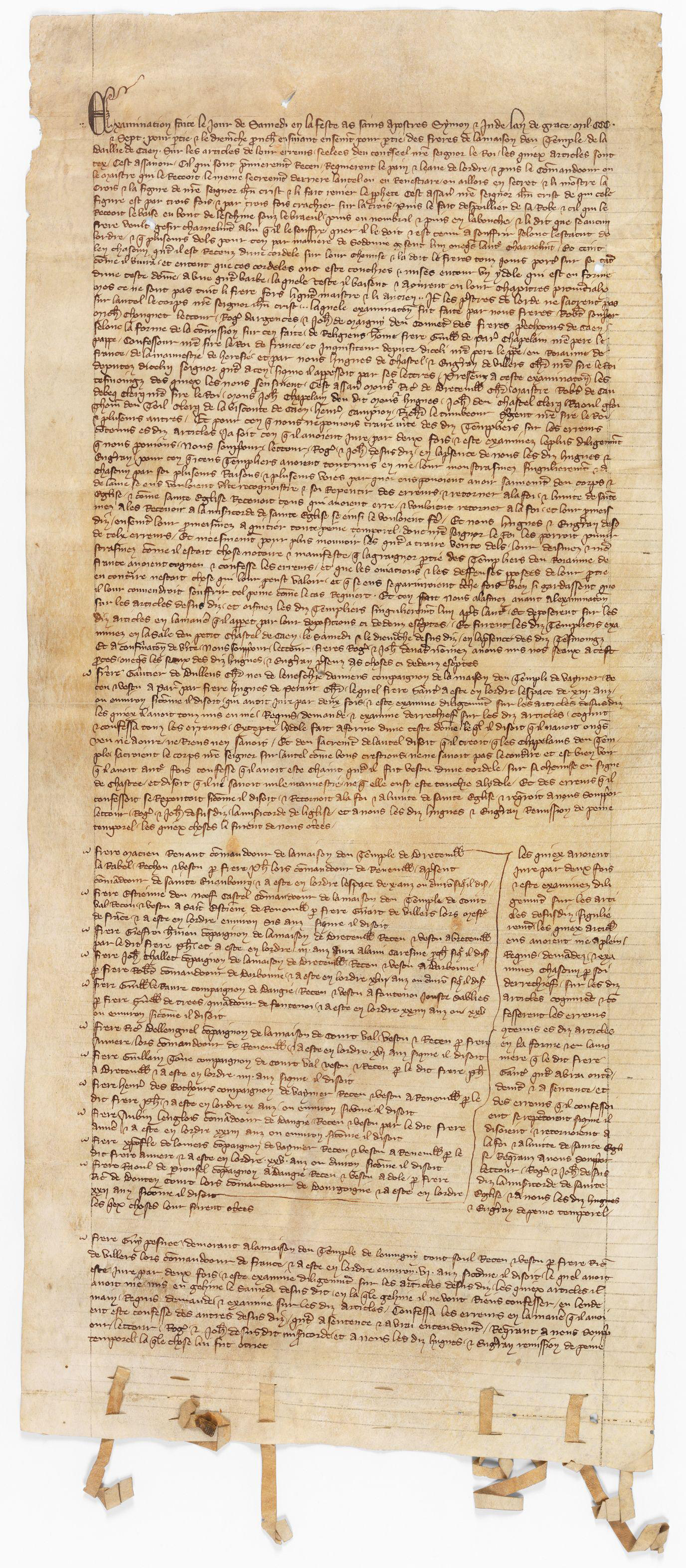 Procès-verbal d’interrogatoire de treize templiers du bailliage de Caen par quatre dominicains du couvent de Caen commis par Guillaume de Paris, inquisiteur de France, et deux commissaires royaux, Hugues du Châtel et Enguerrand de Villers.